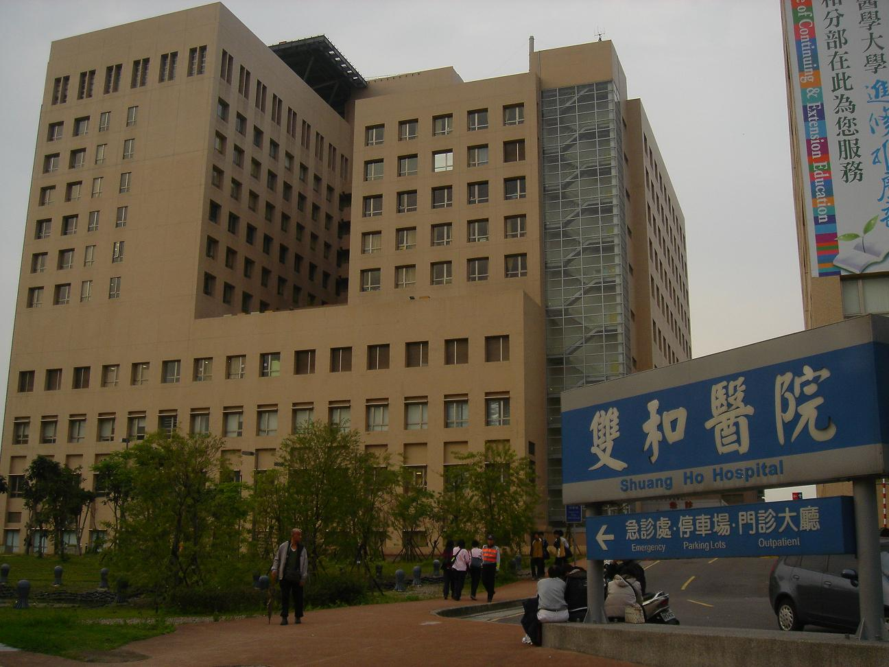 臺北縣中和市雙和醫院後方。